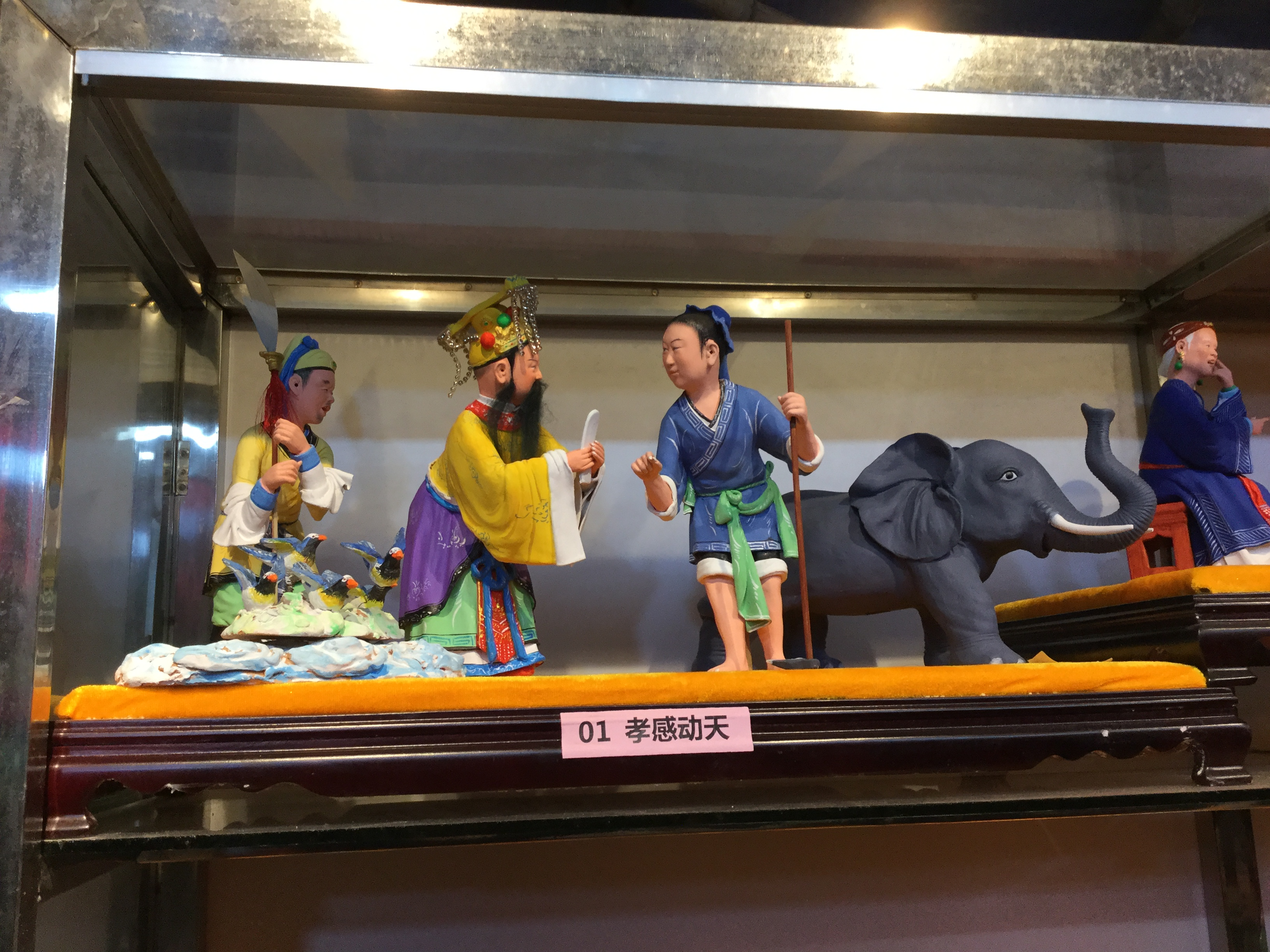 翁仔灯《孝感动天》，摄于2018年3月2日。